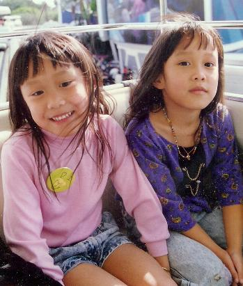 Photo